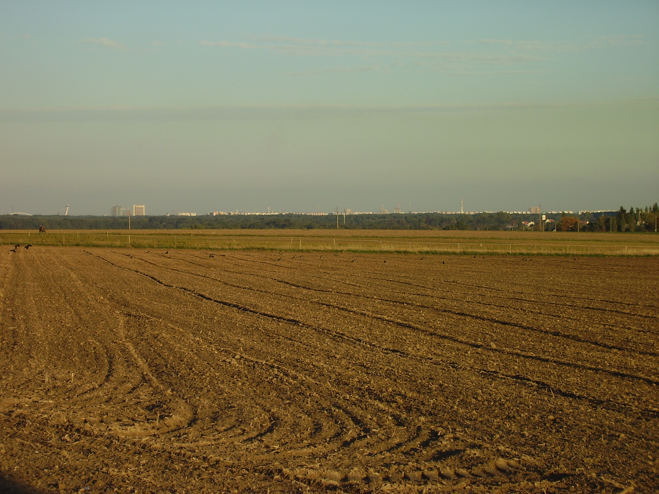 Pohľad na Bratislavu z oblasti neďaleko Wolfsthalu.